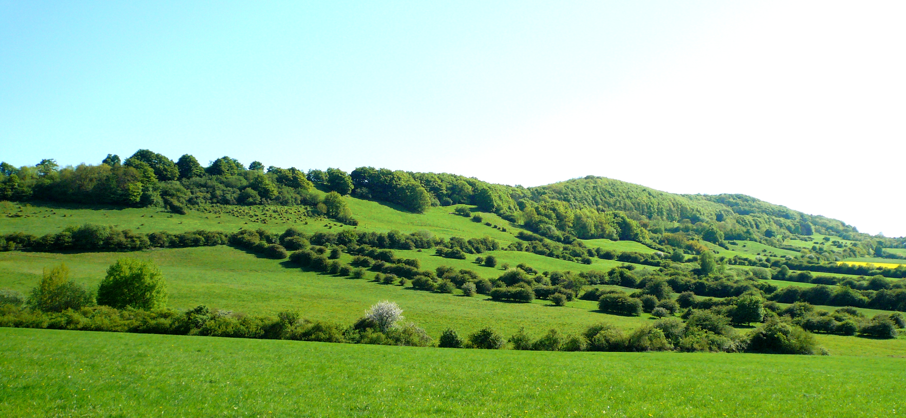 Blick von Norden von der K42 bei Stadtoldendorf auf den Holzberg, Niedersachsen; im Bild Teile des Naturschutzgebiets „Holzbergwiesen“